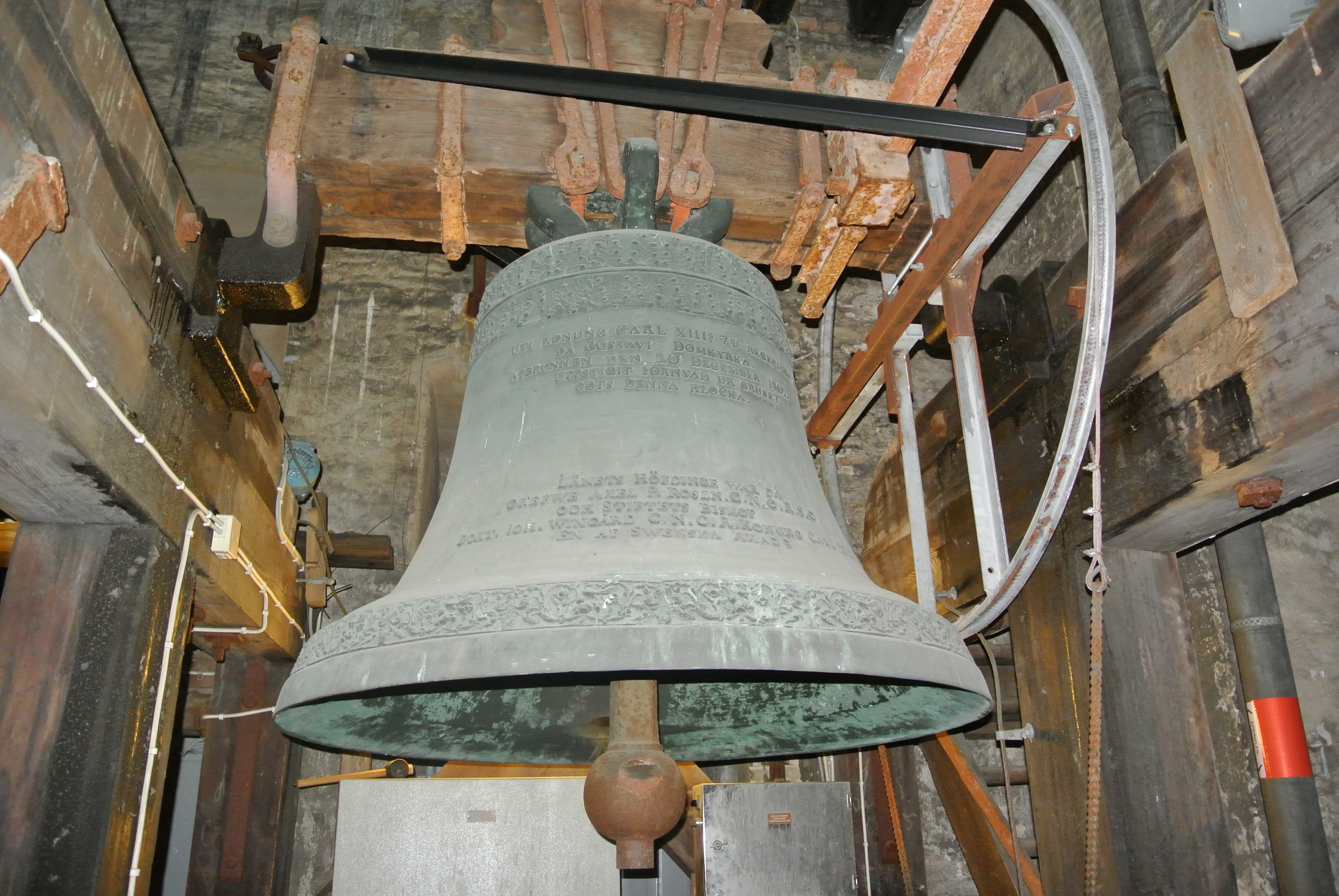 Böneklockan i Göteborgs domkyrka